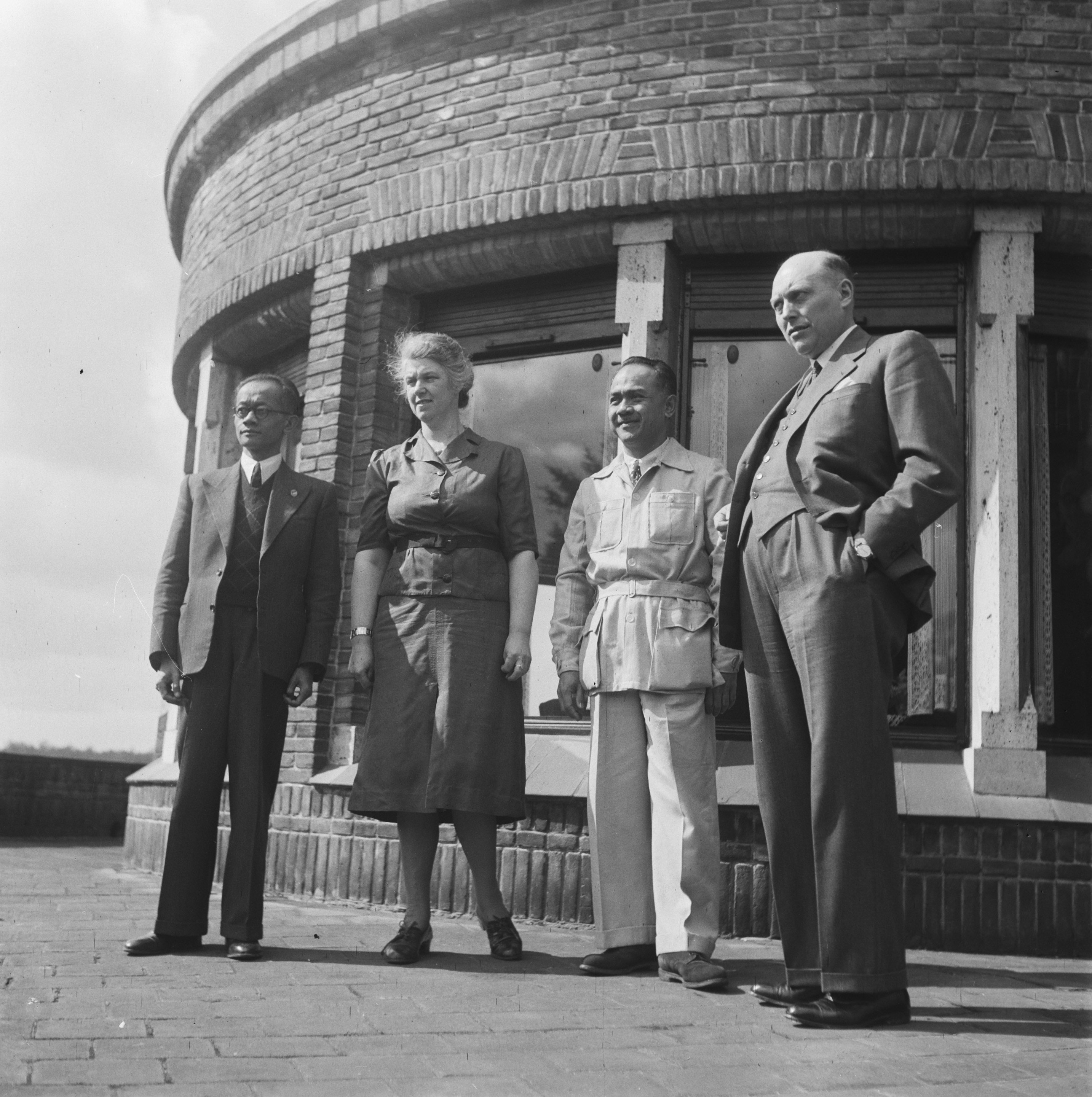 Collectie / Archief : Fotocollectie Anefo Reportage / Serie : [ onbekend ] Beschrijving : Hoge Veluwe Conferentie Nederlands-Indië ( Prof. Schermerhorn en echtgenote en Indonesische deelnemers) Datum : 20 april 1946 Locatie : Hoge Veluwe, Otterlo Trefwoorden : conferenties, groepsportretten Fotograaf : Breijer, Charles / Anefo Auteursrechthebbende : Nationaal Archief Materiaalsoort : Negatief (zwart/wit) Nummer archiefinventaris : bekijk toegang 2.24.01.03 Bestanddeelnummer : 901-6537